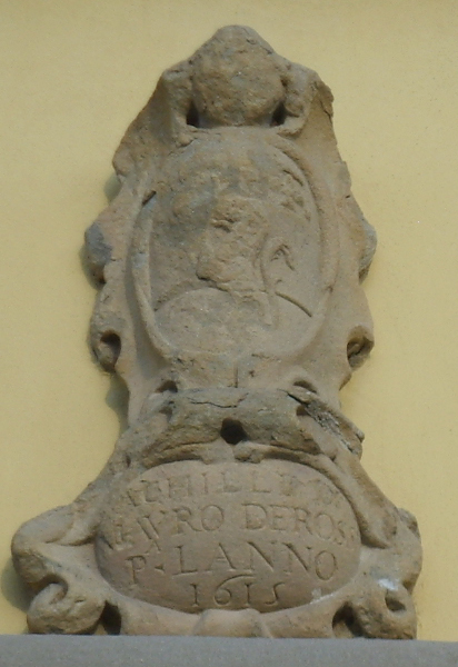 Palazzo pretorio di fiesole, stemma de' rossi 1615